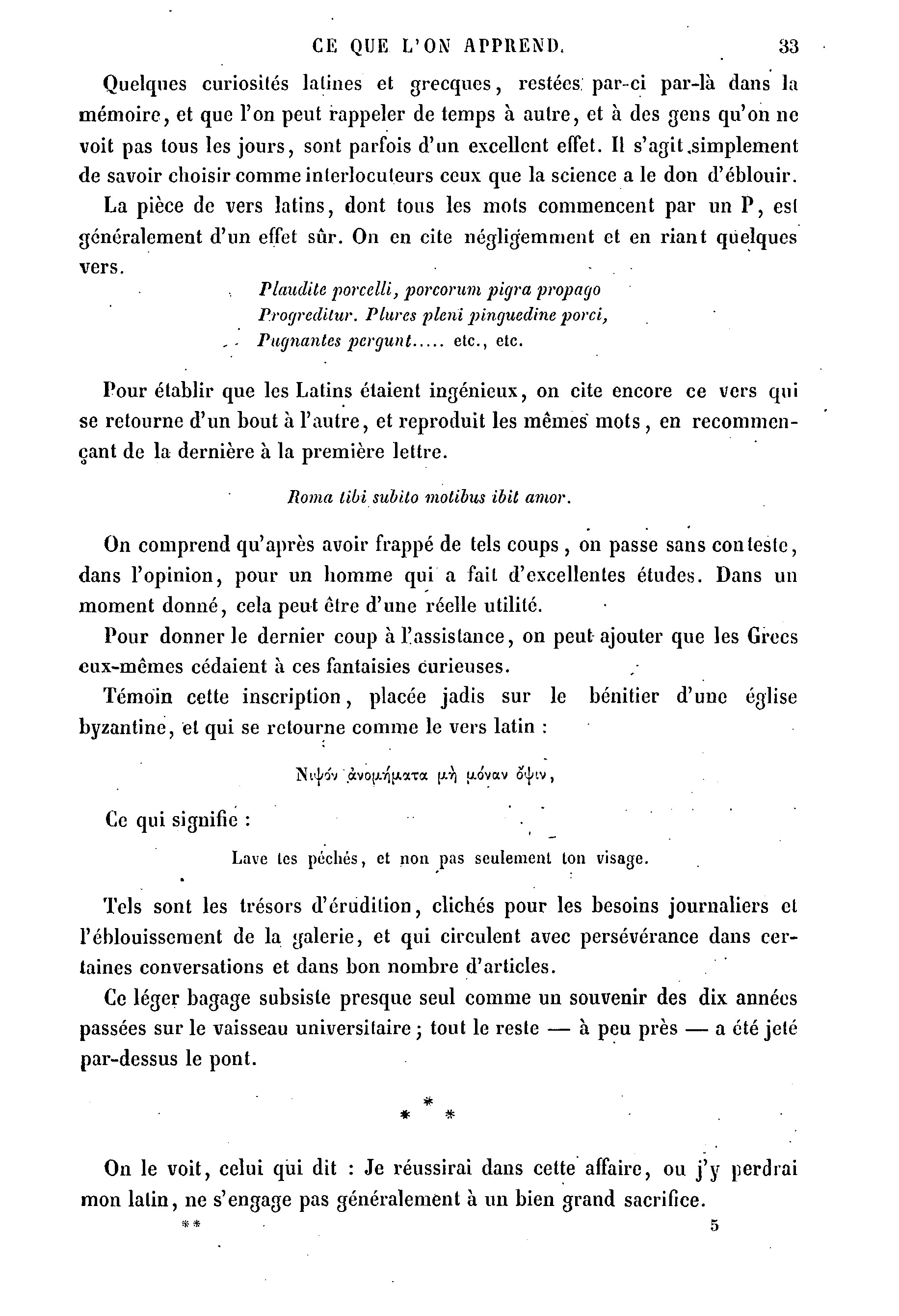 Bertall, La comédie de notre temps. Ce que l'on apprend au collège, 1874-1876, page 37.